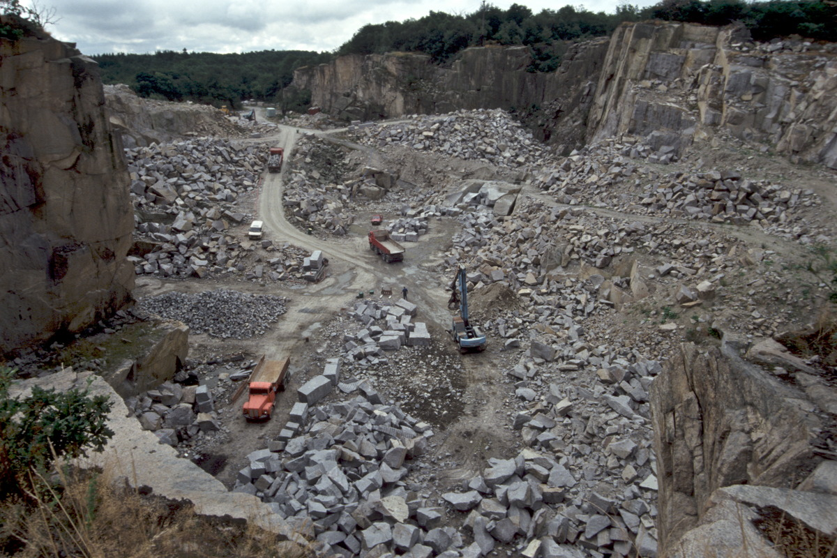 Moseløkken Stenbrud ved Allinge, 1991